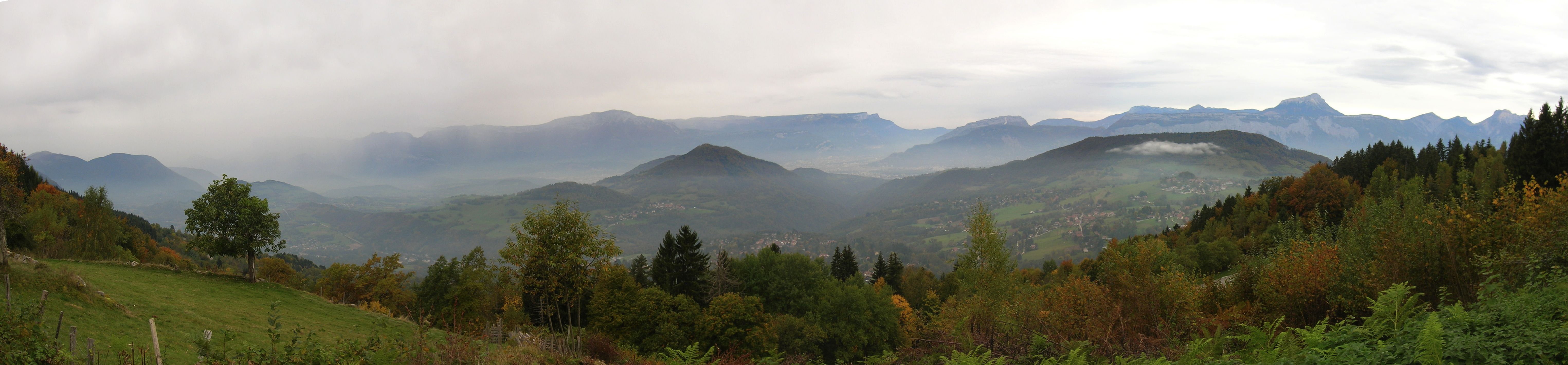 les hameaux vus depuis le Belvédère, Saint-Martin d'Uriage, Isère, France.